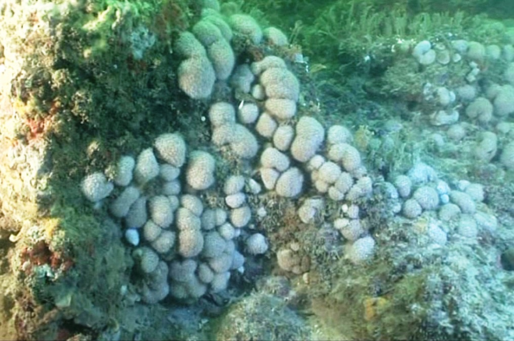 Colonias de Complexum pusillum sp.n., a 10 m de profundidad, en Pointe-Noire, Congo. van Ofwegen LP, Aurelle D, Sartoretto S (2014) A new genus of soft coral (Cnidaria, Octocorallia) from the Republic of Congo (Pointe-Noire Region). ZooKeys 462: 1-10.